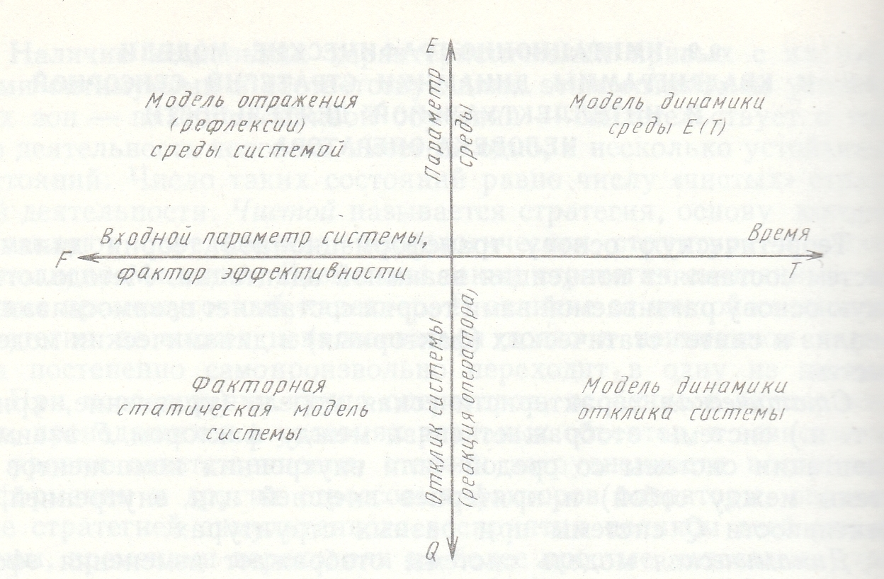 структура квадриграммы